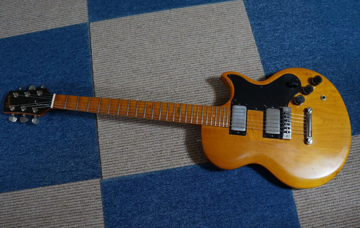 Gibson L6-S